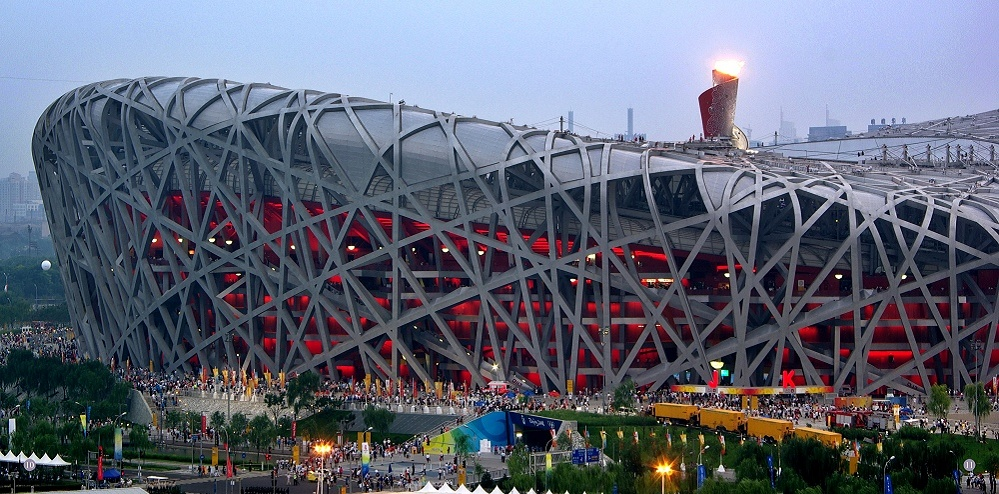 北京国家体育场熊熊燃烧的奥运圣火